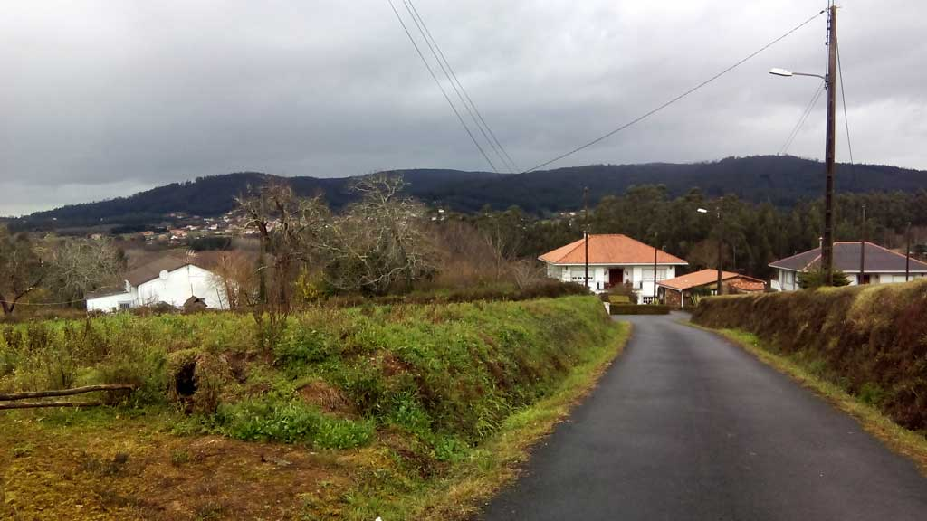 Vista de Santá, Doso, Narón.